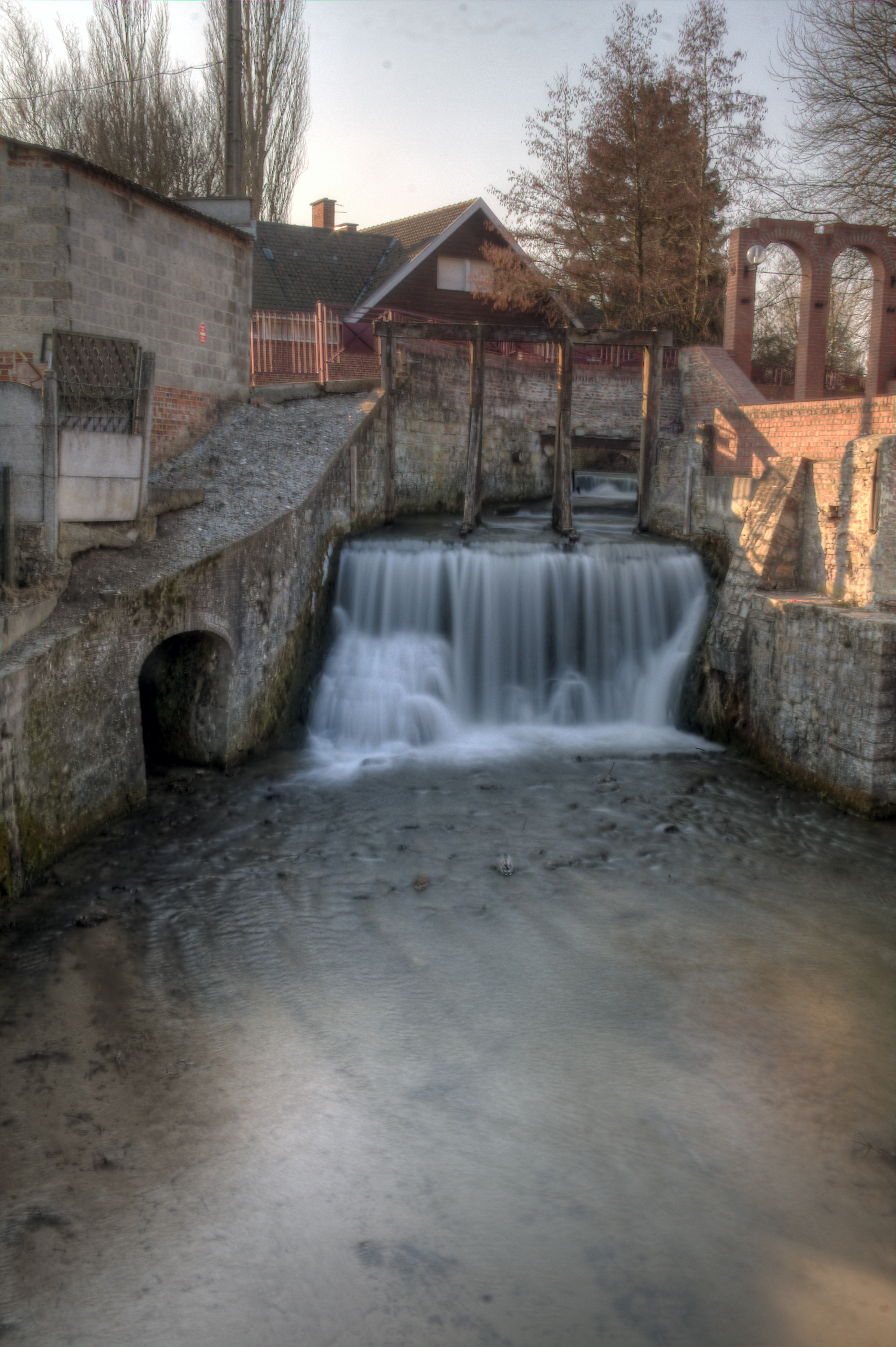 La Scarpe à Maroeuil